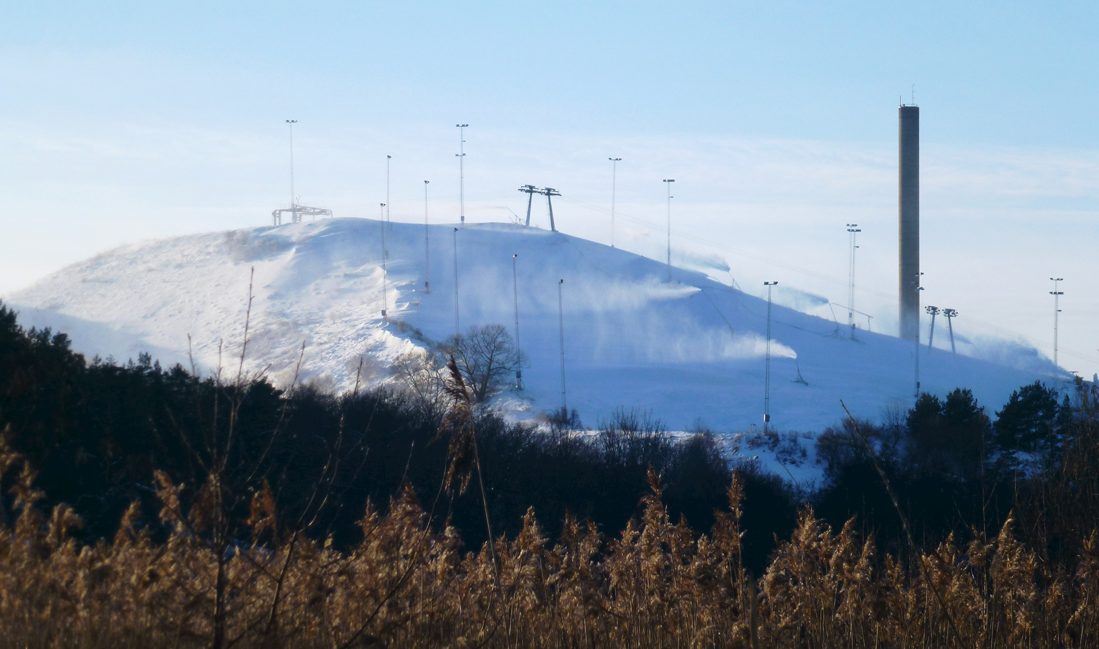 Hammarbytoppens snökanoner är igång